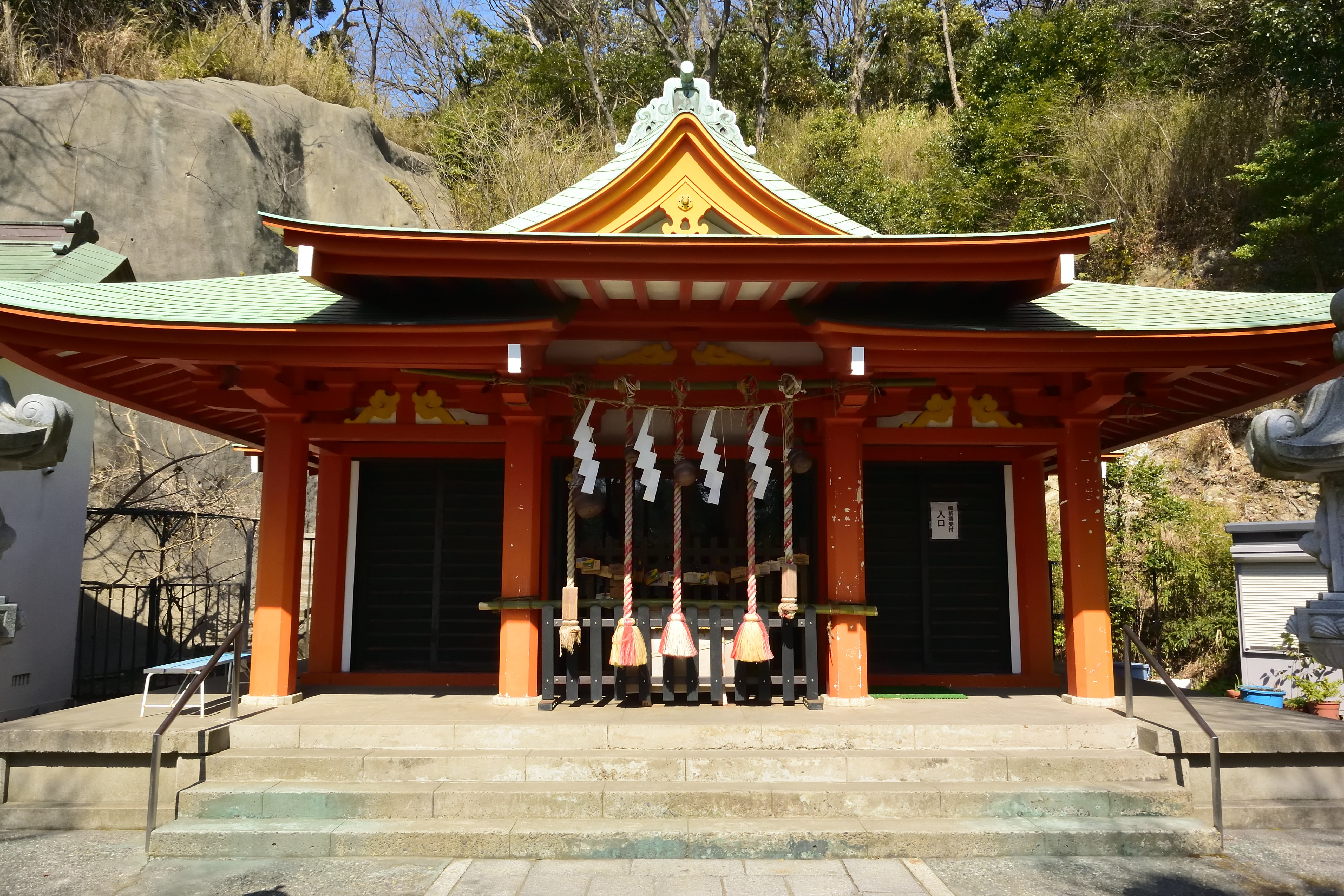 横須賀市雷神社 社殿